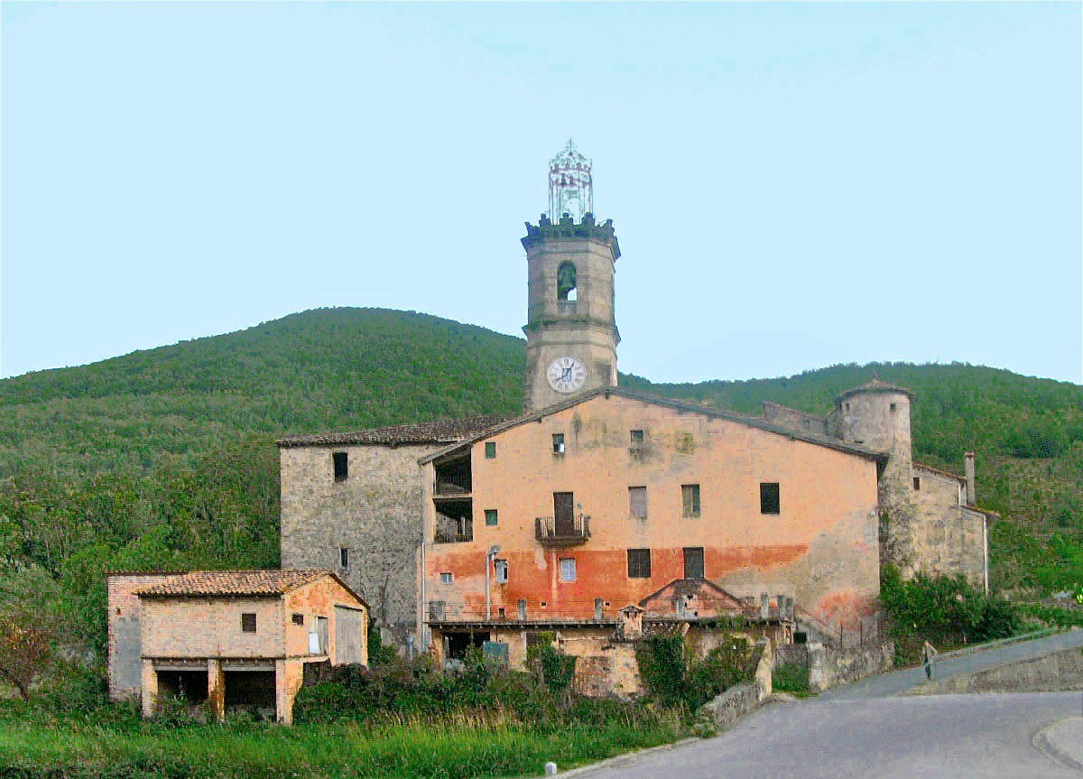 Ridaura, església de Santa Maria, torre, i cases veïnes